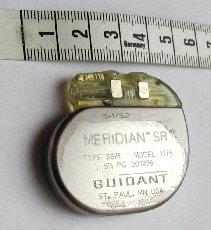 Explantierter SSIR-Herzschrittmacher der Fa. Guidant